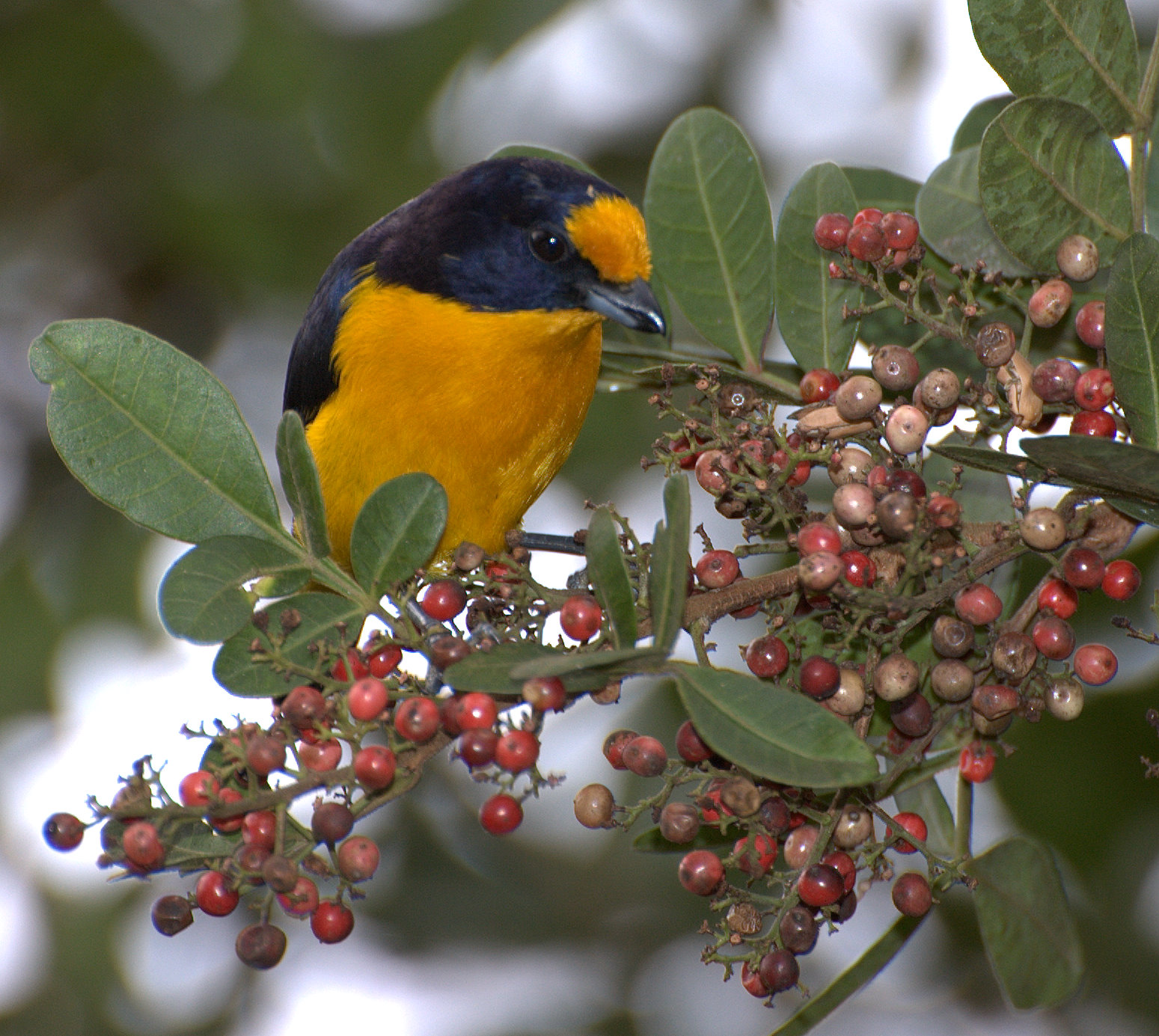 Vale do Ribeira - Registro-SP - Brasil